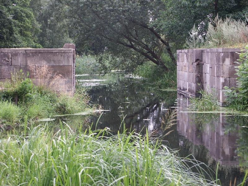 Dücker-Schleuse am Stecknitz-Kanal bei Witzeeze (Blick nach Süden), errichtet ca. 1398, Neubau 1789. Einzige erhaltene Stauschleuse am Stecknitz-Kanal, das Ostufer liegt in Mecklenburg, so dass die Innerdeutsche Grenze durch das Schleusenbecken verlief.